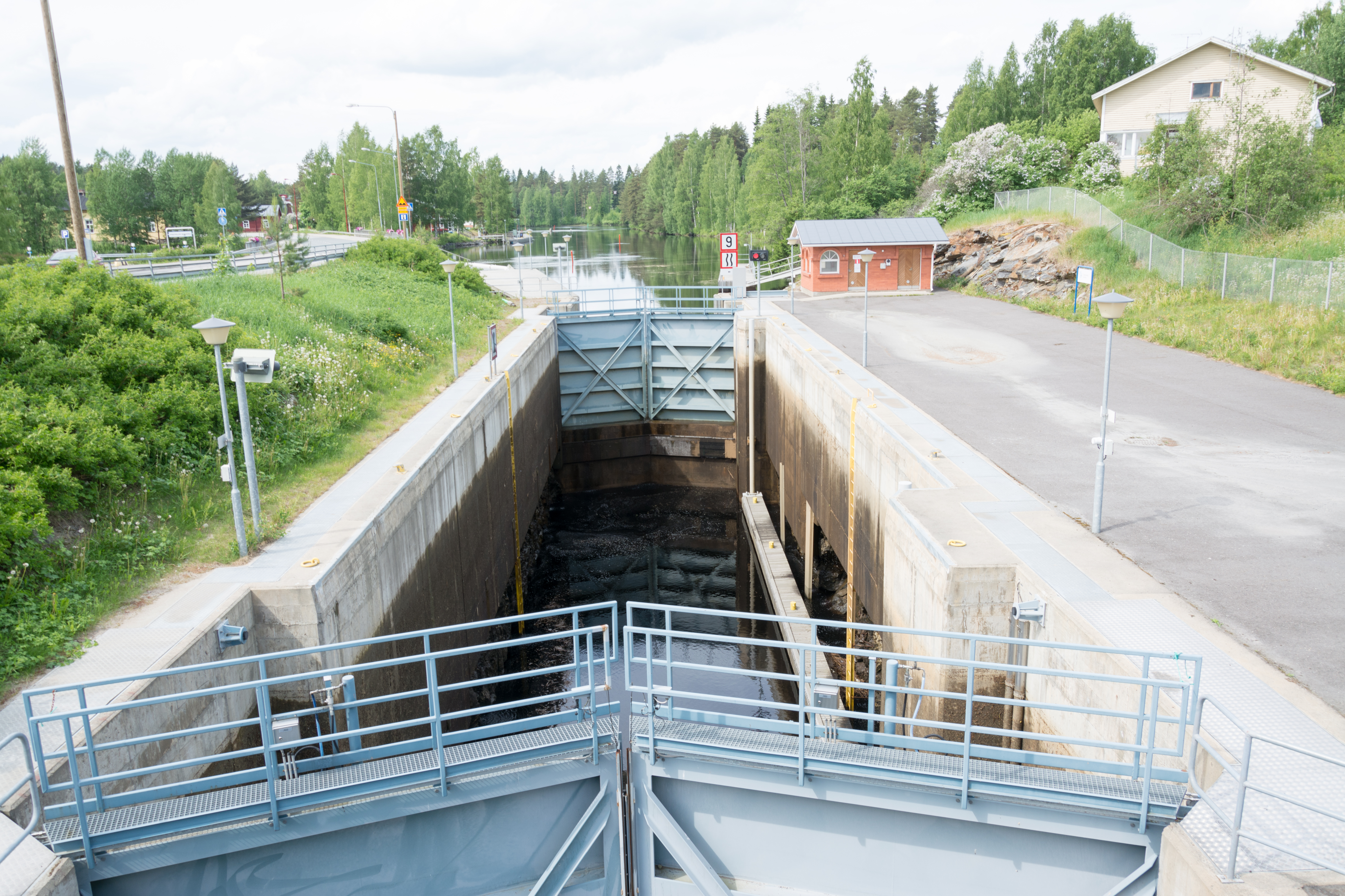 Juankosken kanava